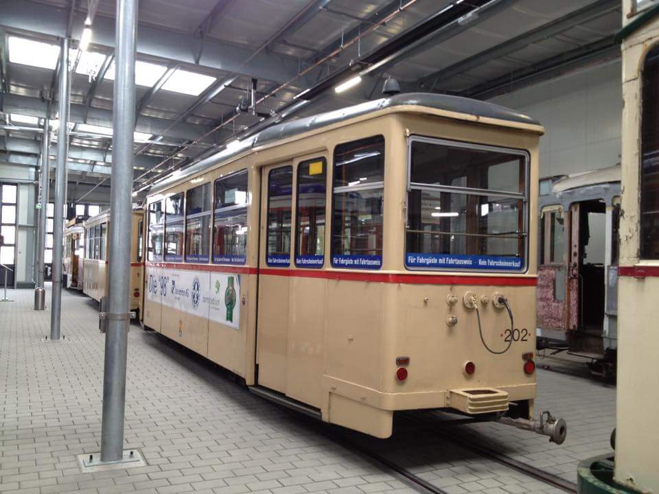 Foto: T. Anstatt Beiwagen Nummer 80 in Darmstadt Kranichstein